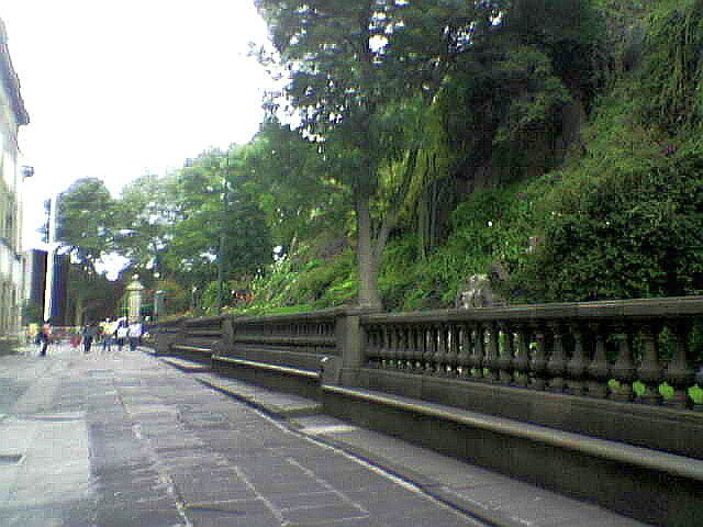 Al pie del Cerro del Tepeyac, junto a la Basílica de Guadalupe en México, D. F.